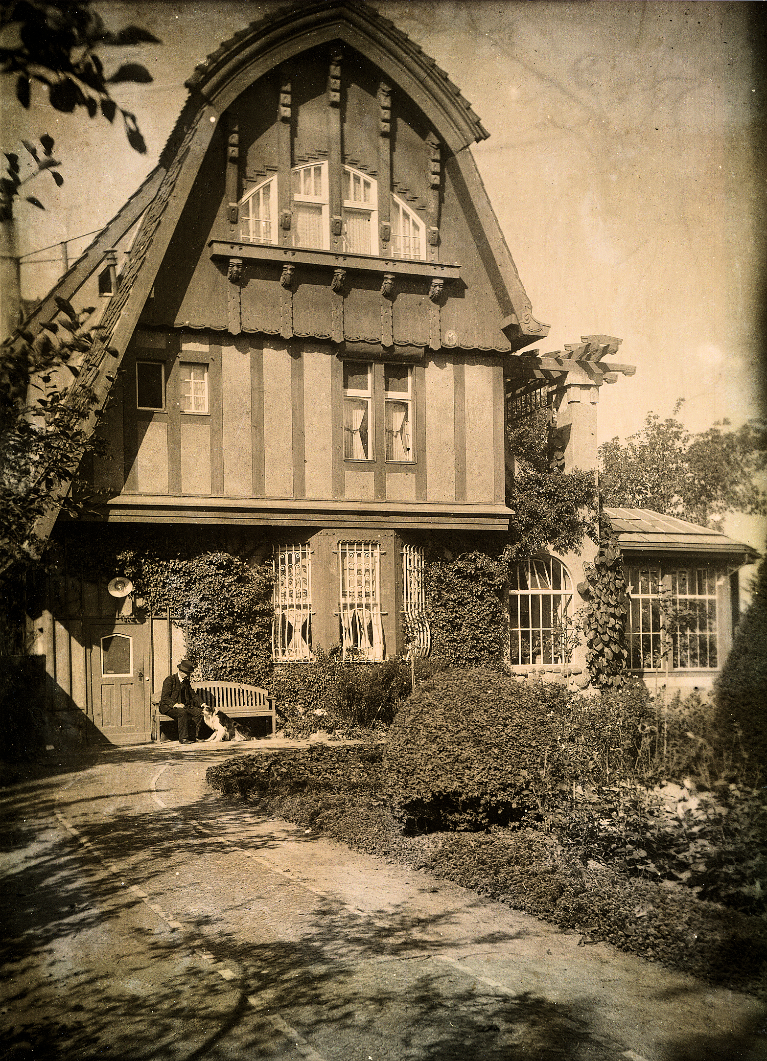 Bruno Möhring mit Hund vor seinem Haus in der Parallelstraße in Berlin-Marienfelde, aufgenommen 1928.